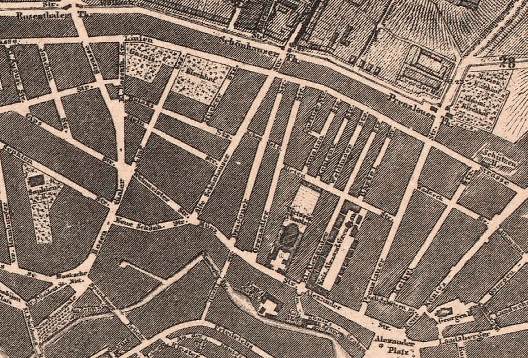 Lage des Scheunenviertels im nördlichen Teil Alt-Berlins. Aus: Übersichtskarte des Bebauungsplanes der Umgebungen Berlins. Der Bebauungsplan in Roth entworfen und vierfach ausgefertigt für das Kgl. Polizei-Präsidium, dem Magistrat von Charlottenburg. Berlin, den 25. April 1862. Oppermann, Regierungs- und Baurath. Gesehen und genehmigt: Berlin, 18. Juli 1862.